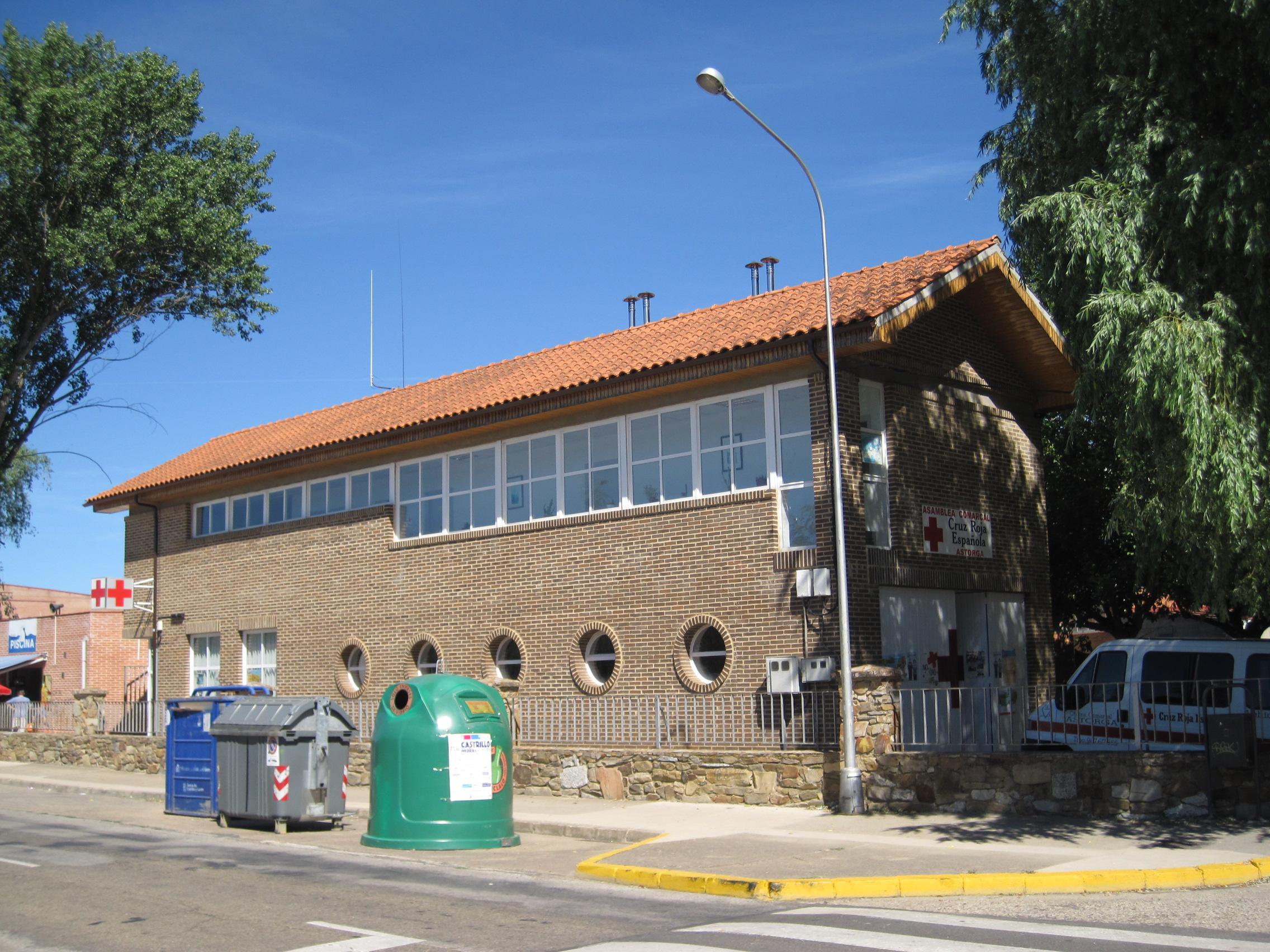 Edificio de la Cruz Roja en Astorga (León, España).